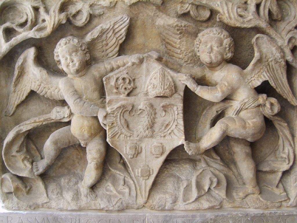 Herb Sulima biskupa płockiego Erazma Ciołka z krakowskiego Collegium Maius